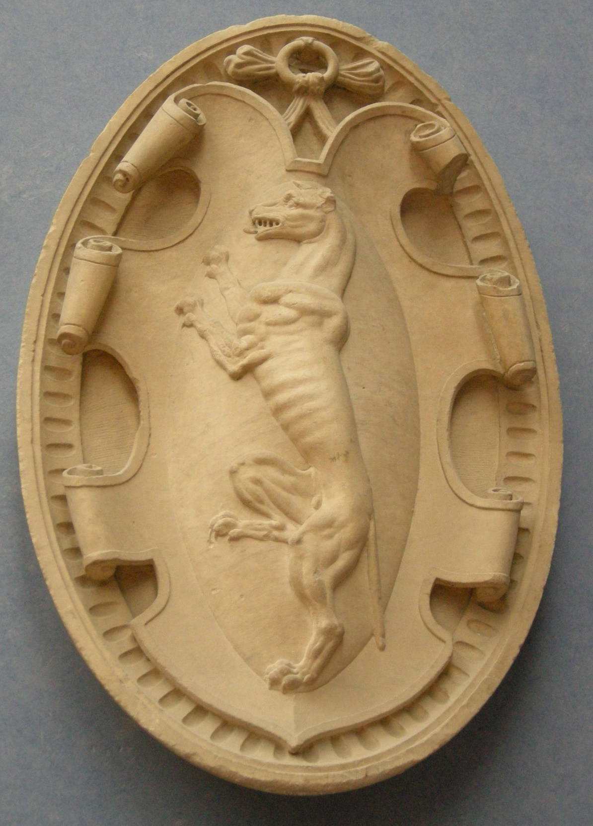 Museo bardini, prima sala, stemma altoviti